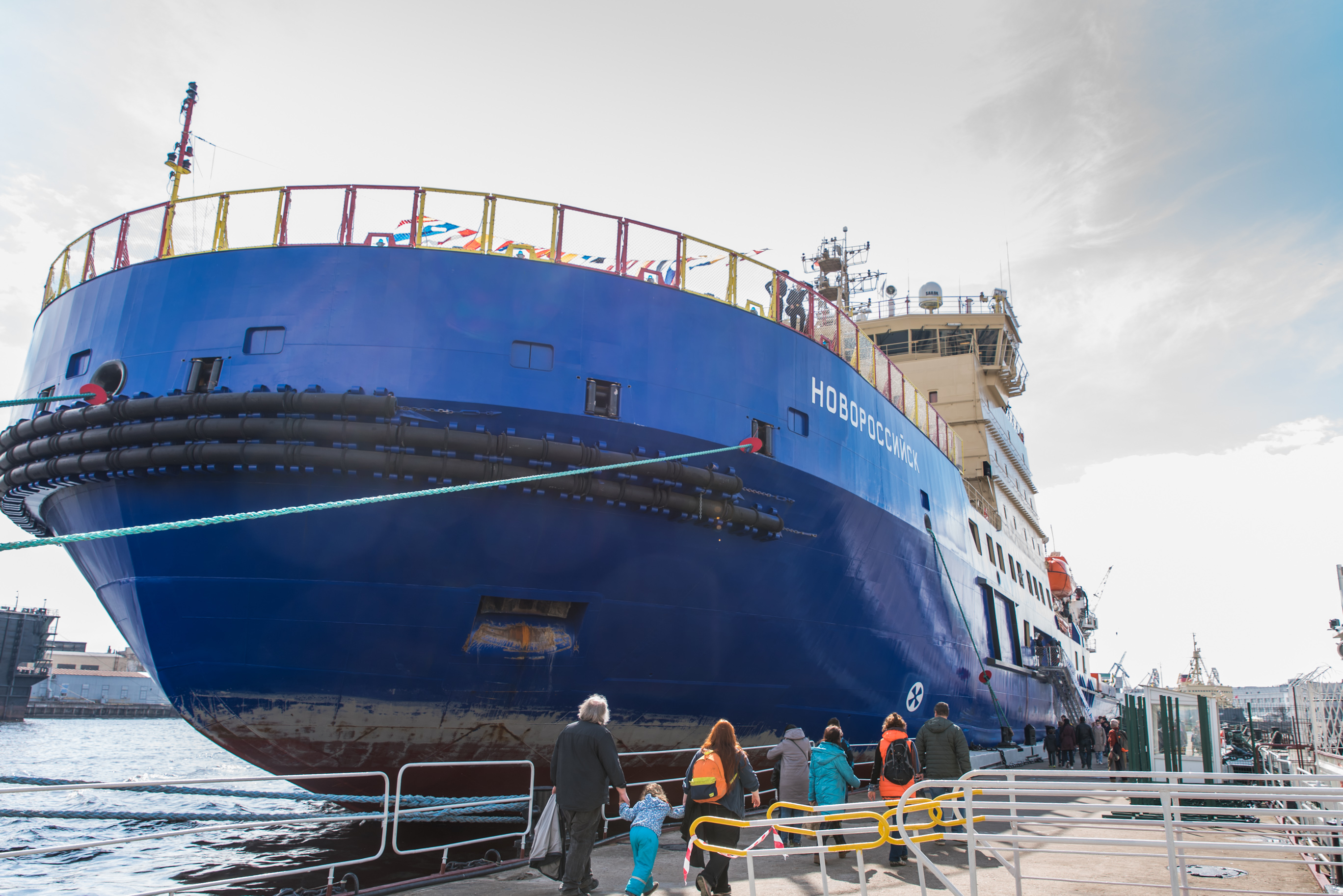 V Фестиваль ледоколов в СПб. Ледокол Новороссийск